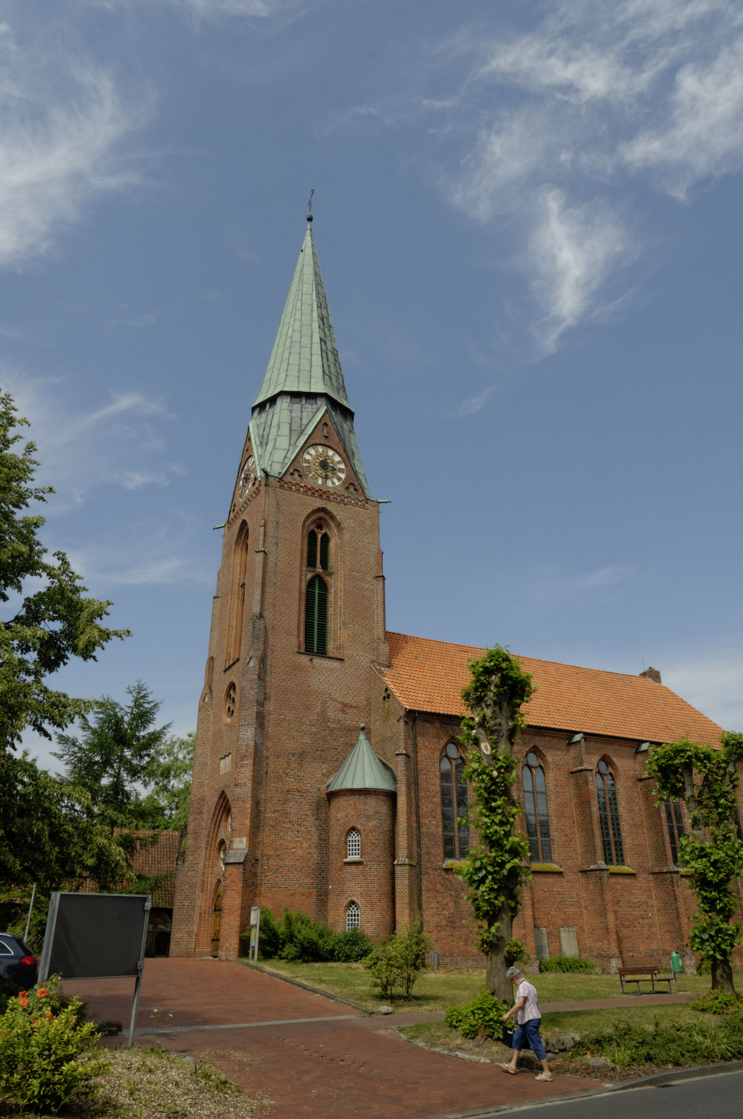 St. Jakobikirche (Bad Bederkesa) Expermetaldaten für spätere Bearbeitung